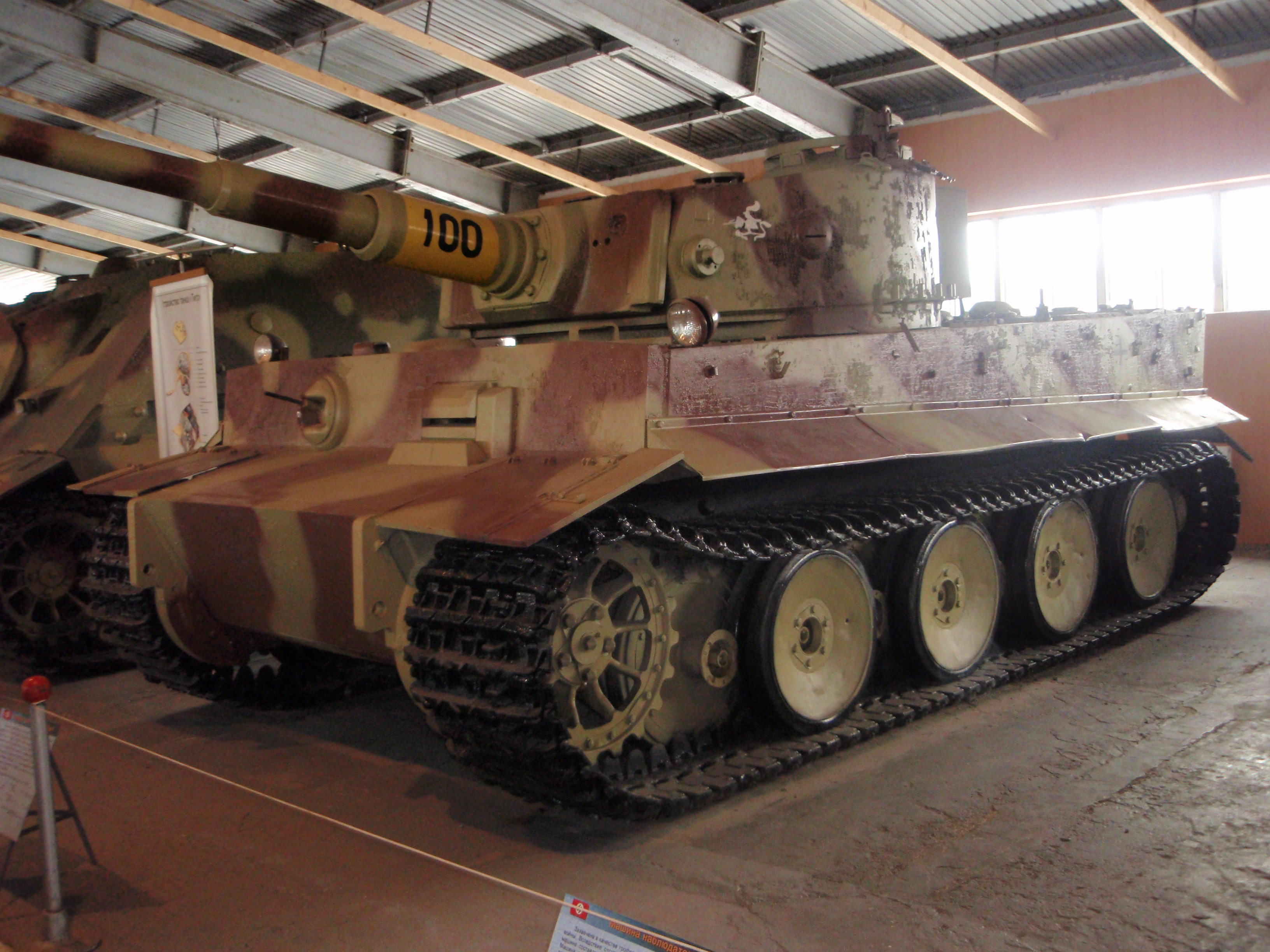 Немецкий тяжёлый танк Pz.VI (Tiger I) в Кубинке